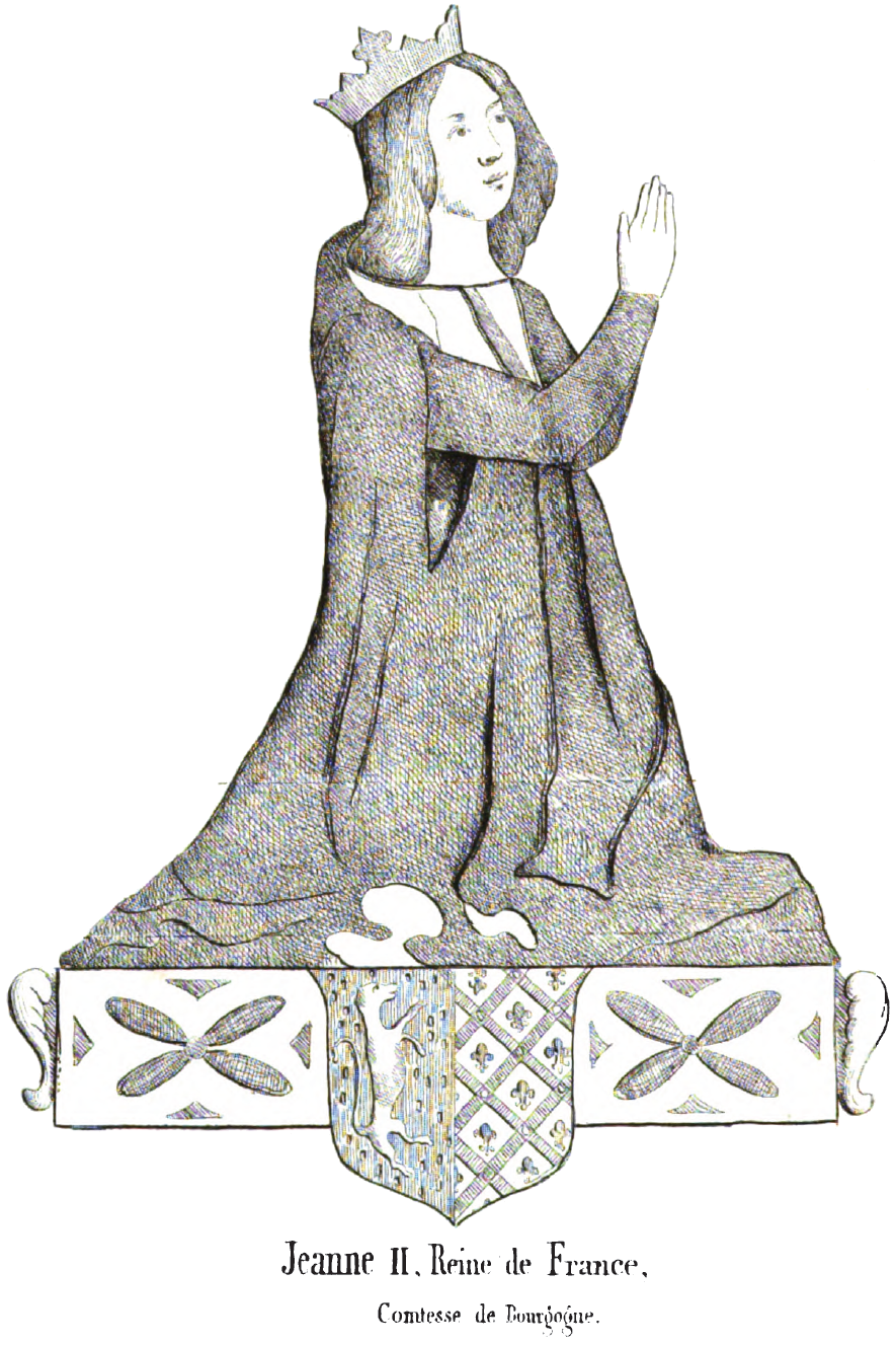 Jeanne II, comtesse de Bourgogne, Reine de France épouse de Philippe V